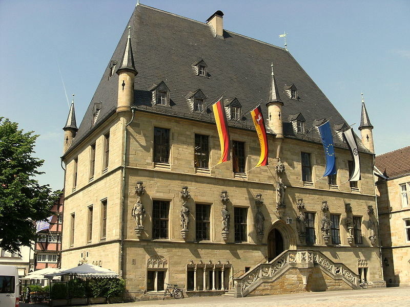 Rathaus OSABRÜCK